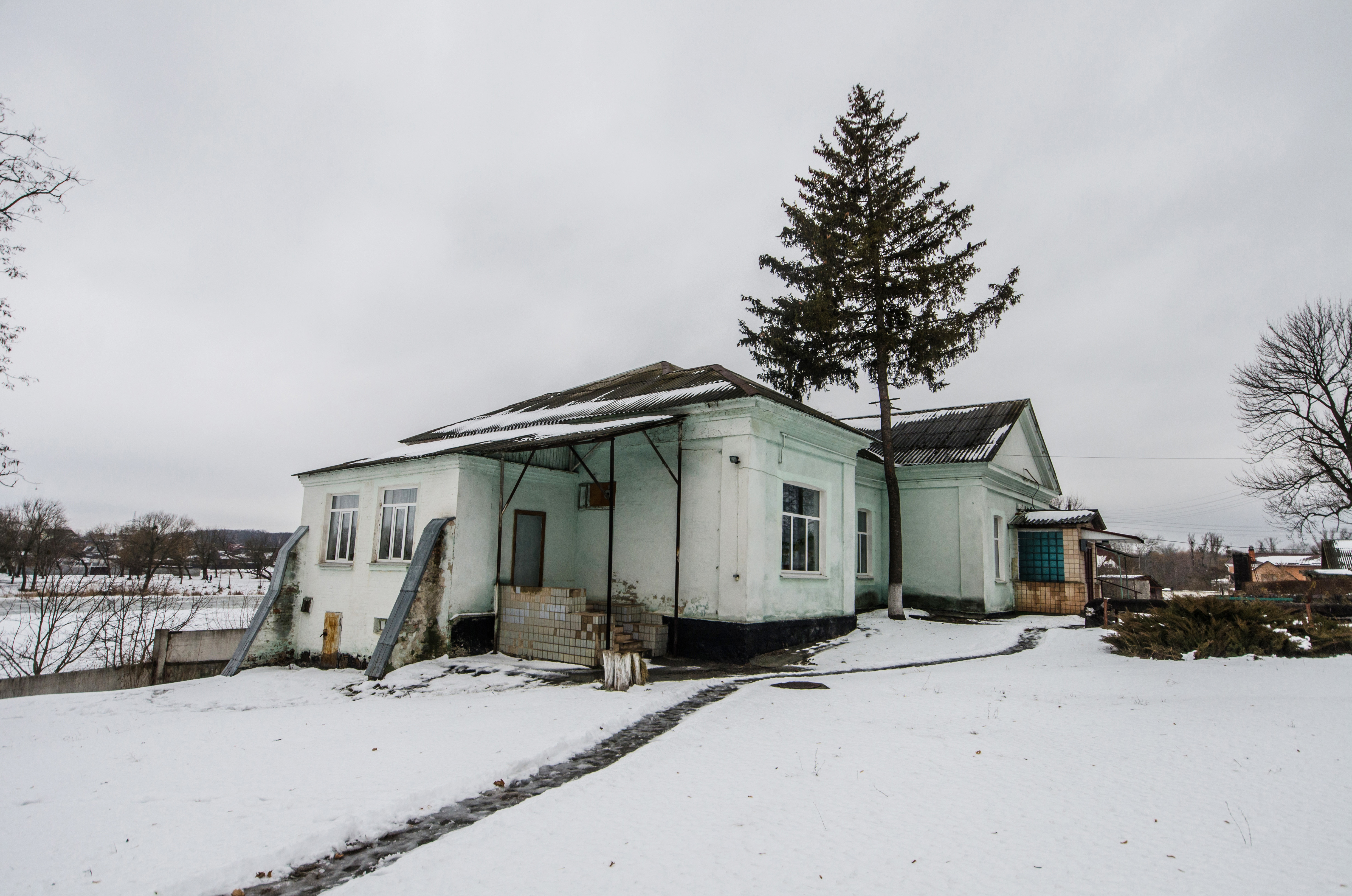 Лікарня, яку очолював Домінік П'єр Де ля Фліз